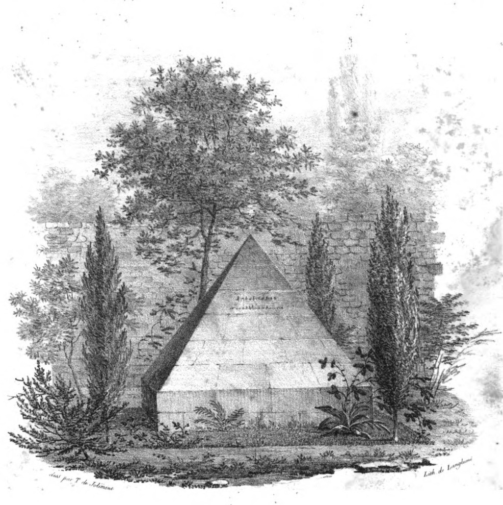 François Gabriel Théodore Busset de Jolimont, Les mausolées français, 1821